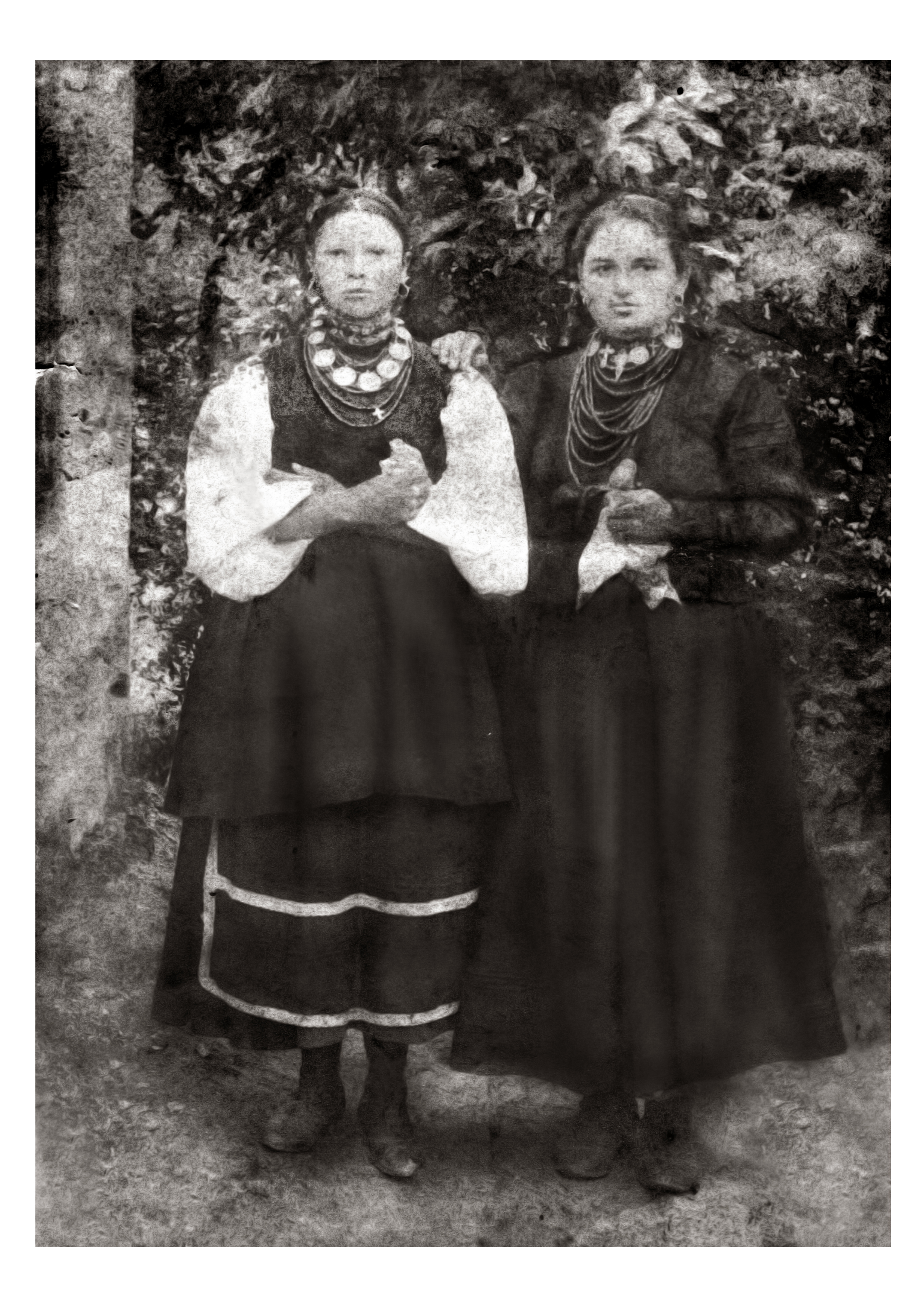 Фотокартка мешканки села Боровикове (Звенигородський р-н)., Черкаської області Сокирко (Миргородська) Євфимія з подругою виготовлена в фотоательє в смт. Вільшана приблизно в період з 1915 по 1920 рр.